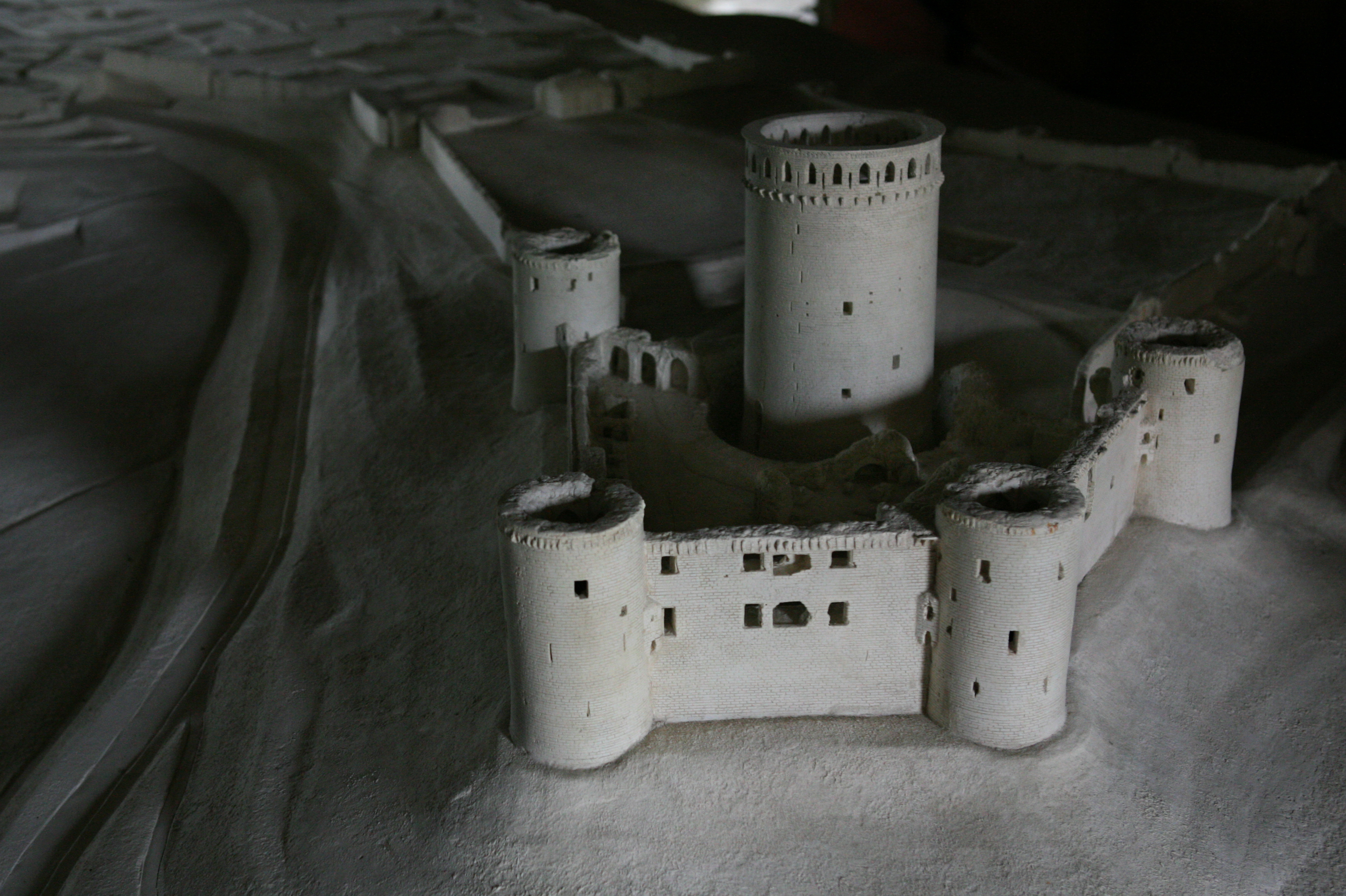 Modèle du Château de Coucy. Trouvé dans le bureau du tourisme à la porte de Soissons, Coucy-le-Château, France